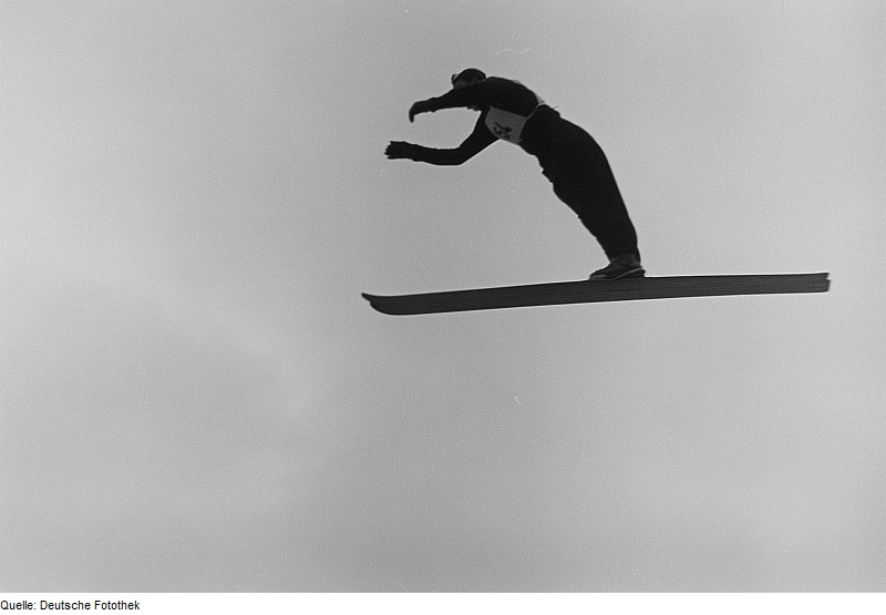 Original image description from the Deutsche FotothekSkispringen auf der "Schanze des Friedens"